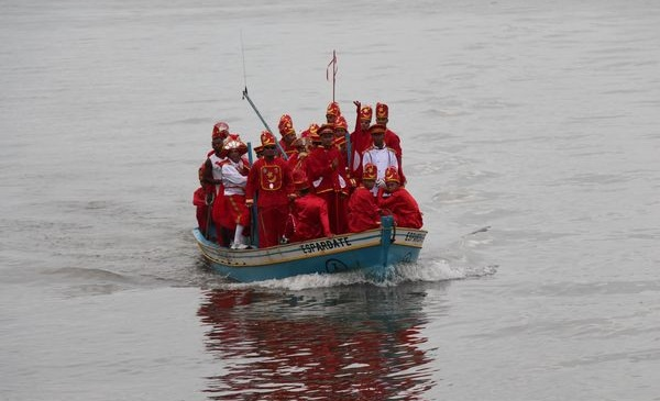 hsdbsbbd